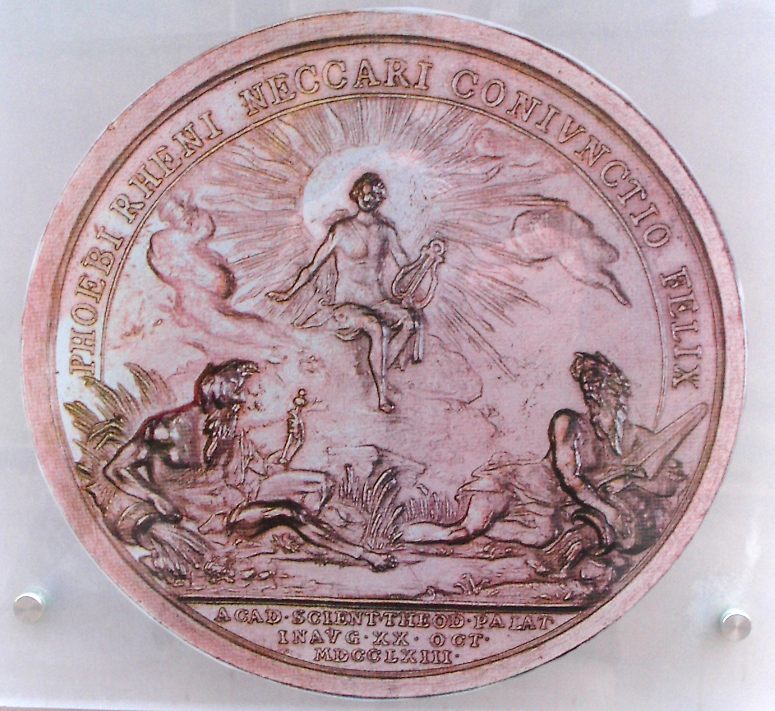 Medaille zur Gründung der Kurpfälzischen Akademie der Wissenschaften, Mannheim, 1763, Abbildung auf öffentlicher Tourismustafel vor der Sternwarte Mannheim